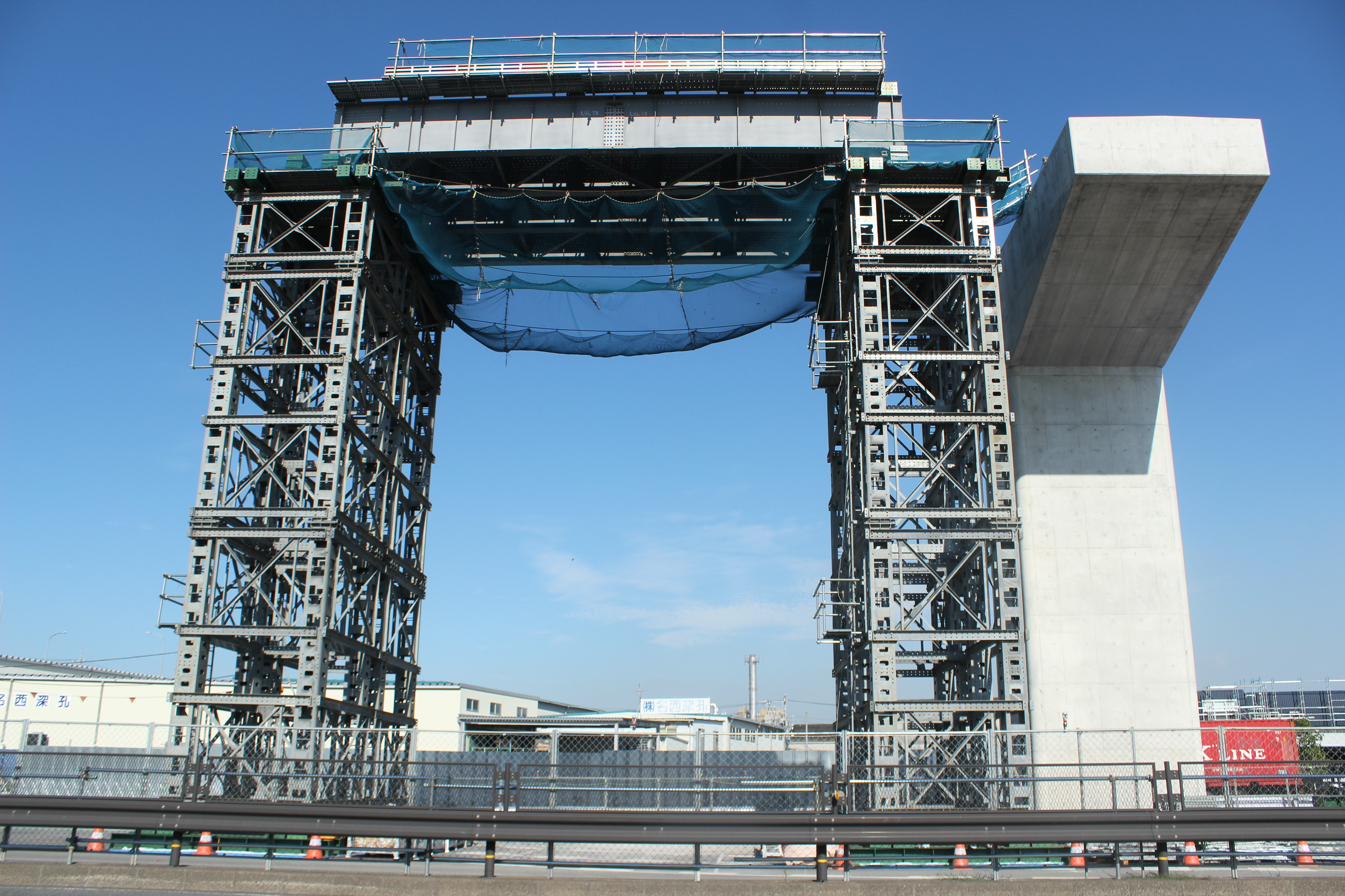 名古屋第二環状自動車道延伸工事（梅之郷交差点付近）